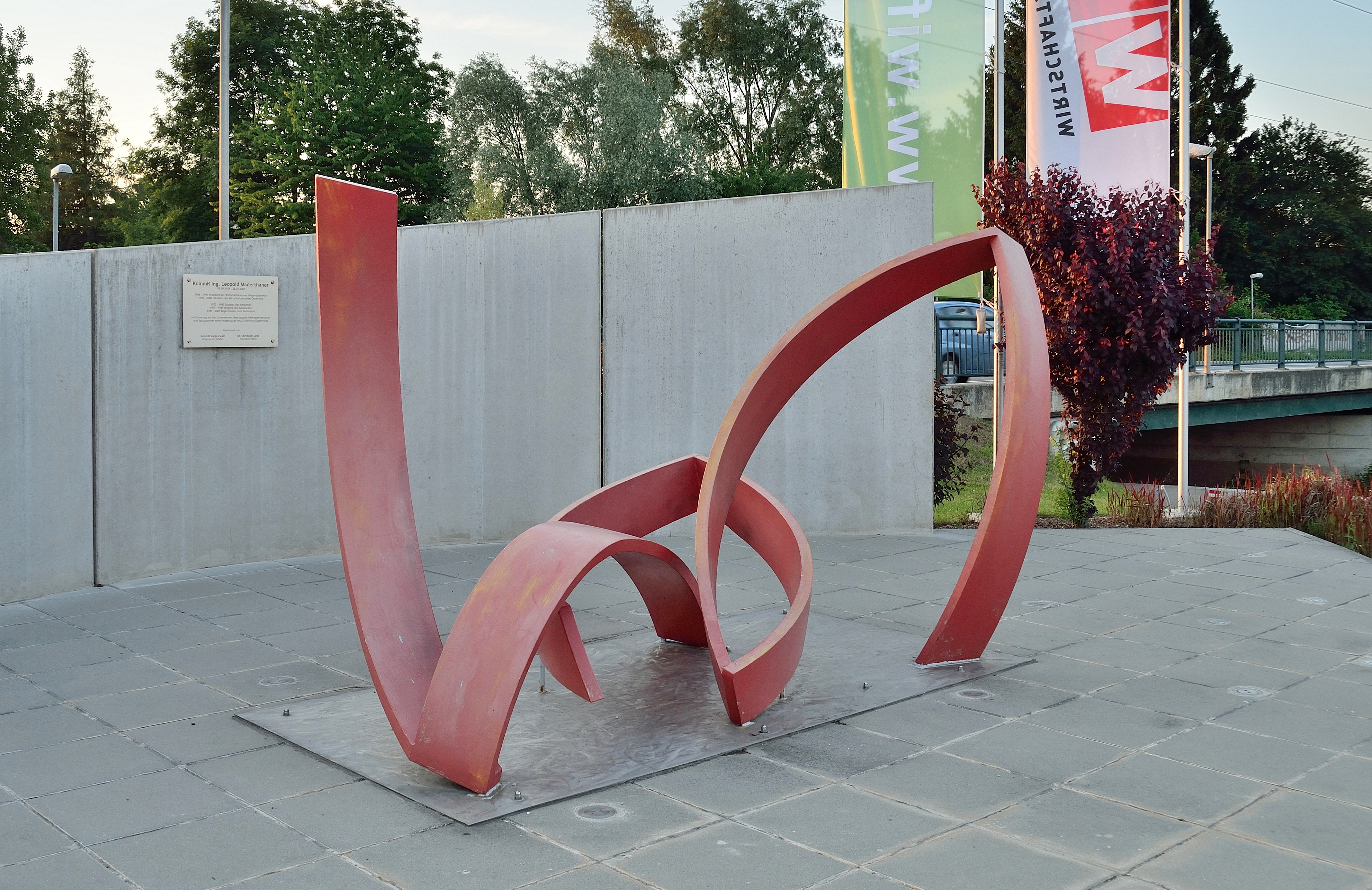 Vor dem Gebäude der WKÖ in Amstetten wurde im September 2015 eine Gedenktafel für den ehemaligen Wirtschaftskammerpräsidenten und Sozialpartner Leopold Maderthaner enthüllt. Maderthaner war 13 Jahre Stadtrat in Amstetten. Vor der Gedenktafel steht eine Skulptur von Robert Kabas, die stilisiert die Inialen LM in geschwungenen Metallbändern darstellt.